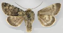 Lasionycta gelida male